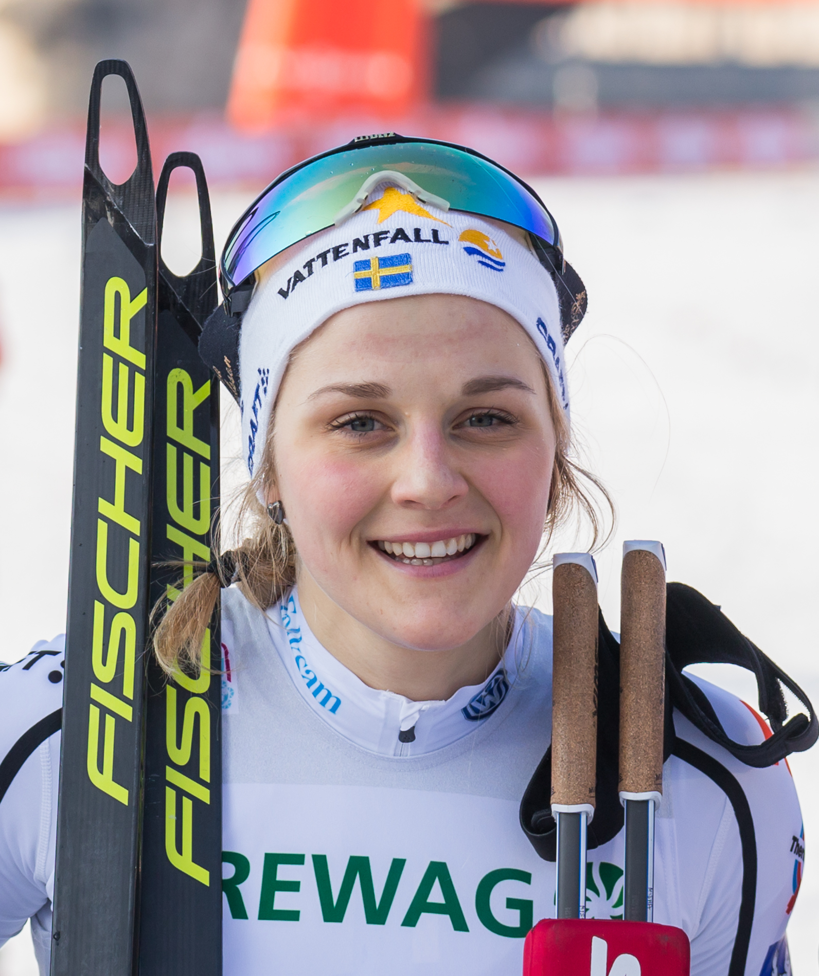 v.li.: Stina Nilsson (SWE, Schweden); Zweitplatzierter, Silbermedaille, silver medal